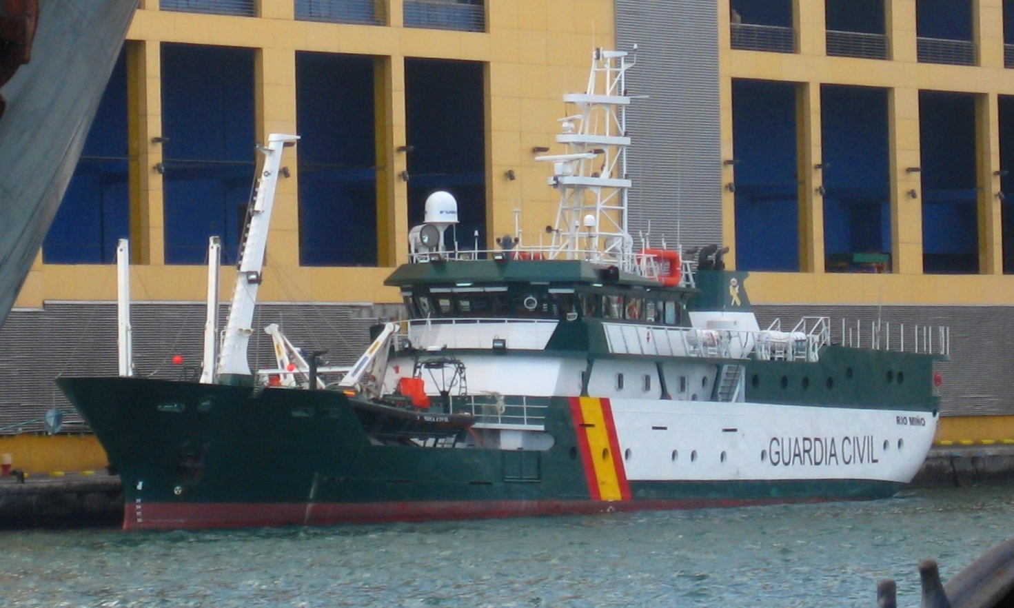 Patrullero "Río Miño" del Servicio Marítimo de la Guardia Civil.